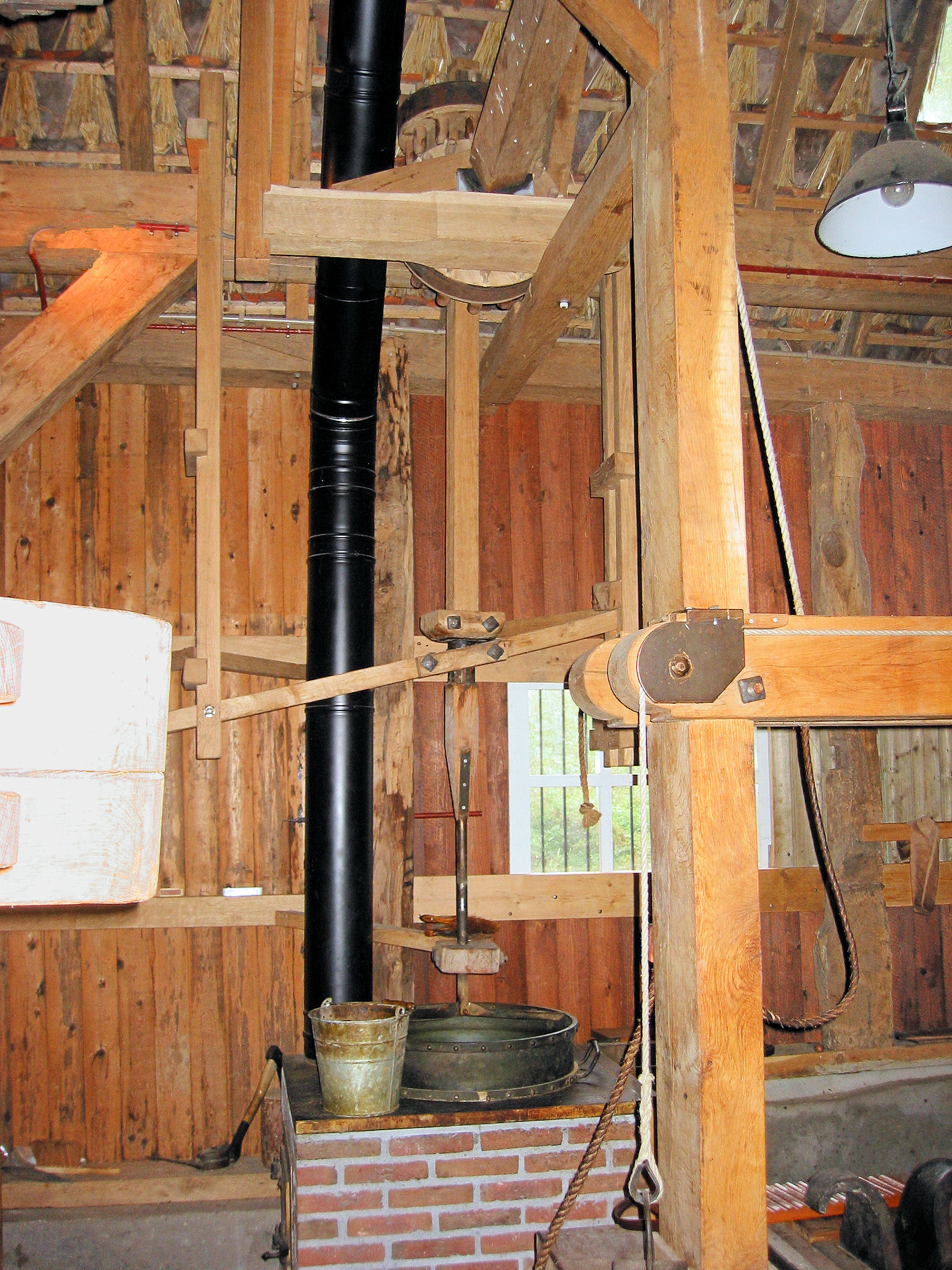 Collse Watermolen, vuister, Eindhoven-Tongelre, the Netherlands